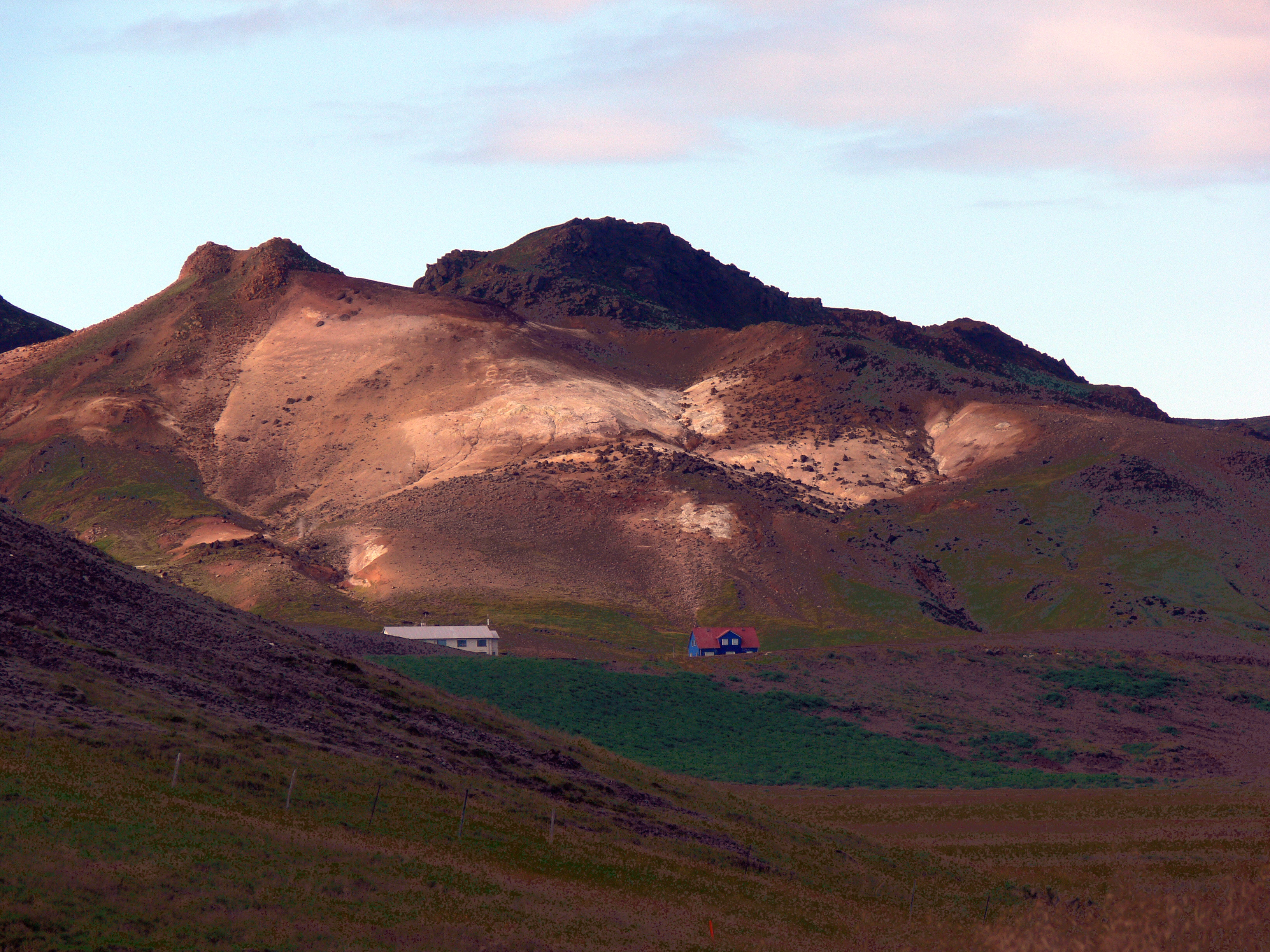 Blick von der Krýsuvíkurkirkja nach Seltun